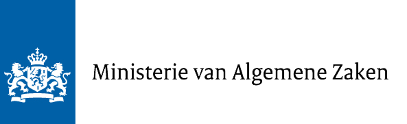 Het officiële logo van het Ministerie van Algemene Zaken